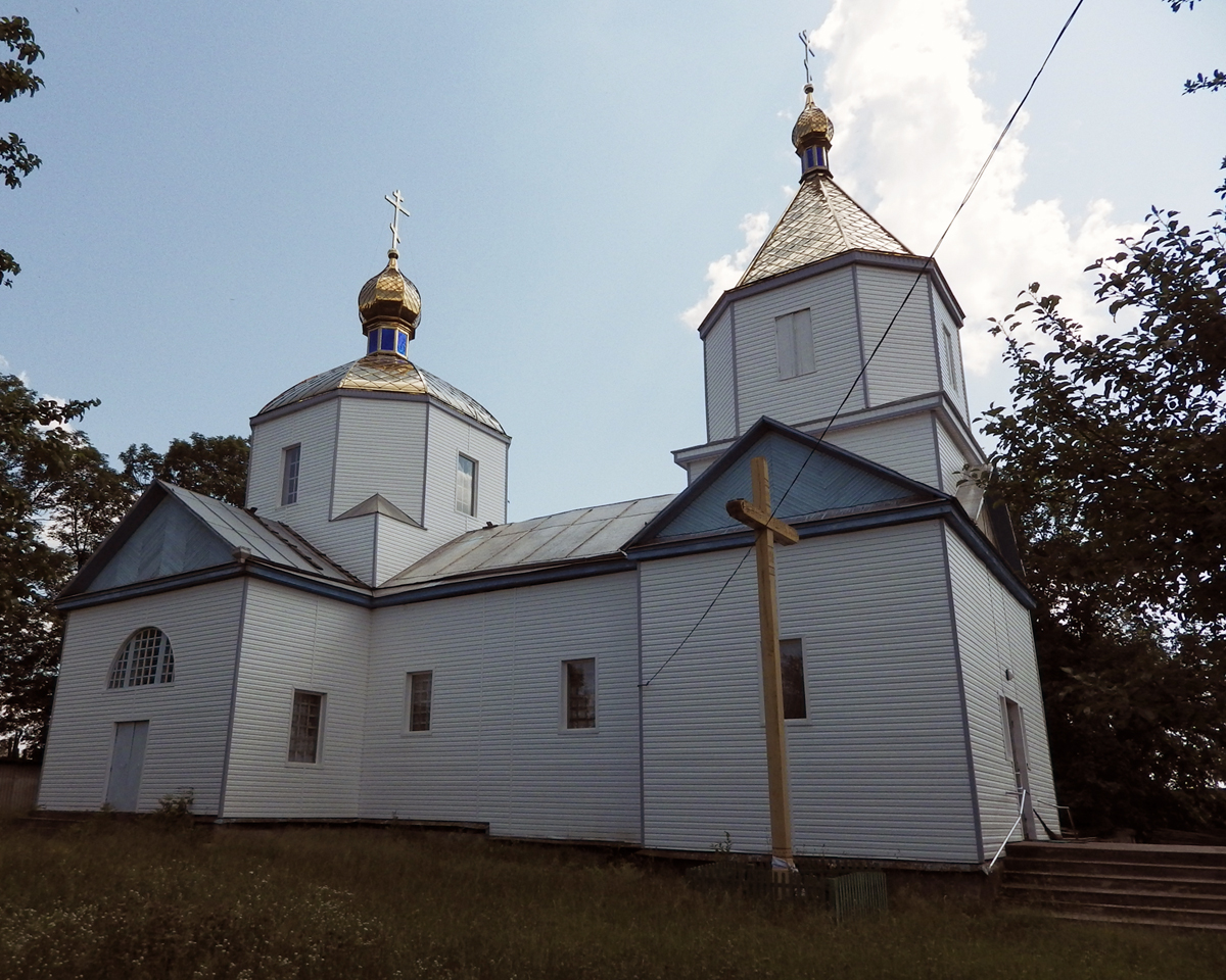 Церква Різдва Богородиці, смт. Лугини, вул. Колгоспна, 33